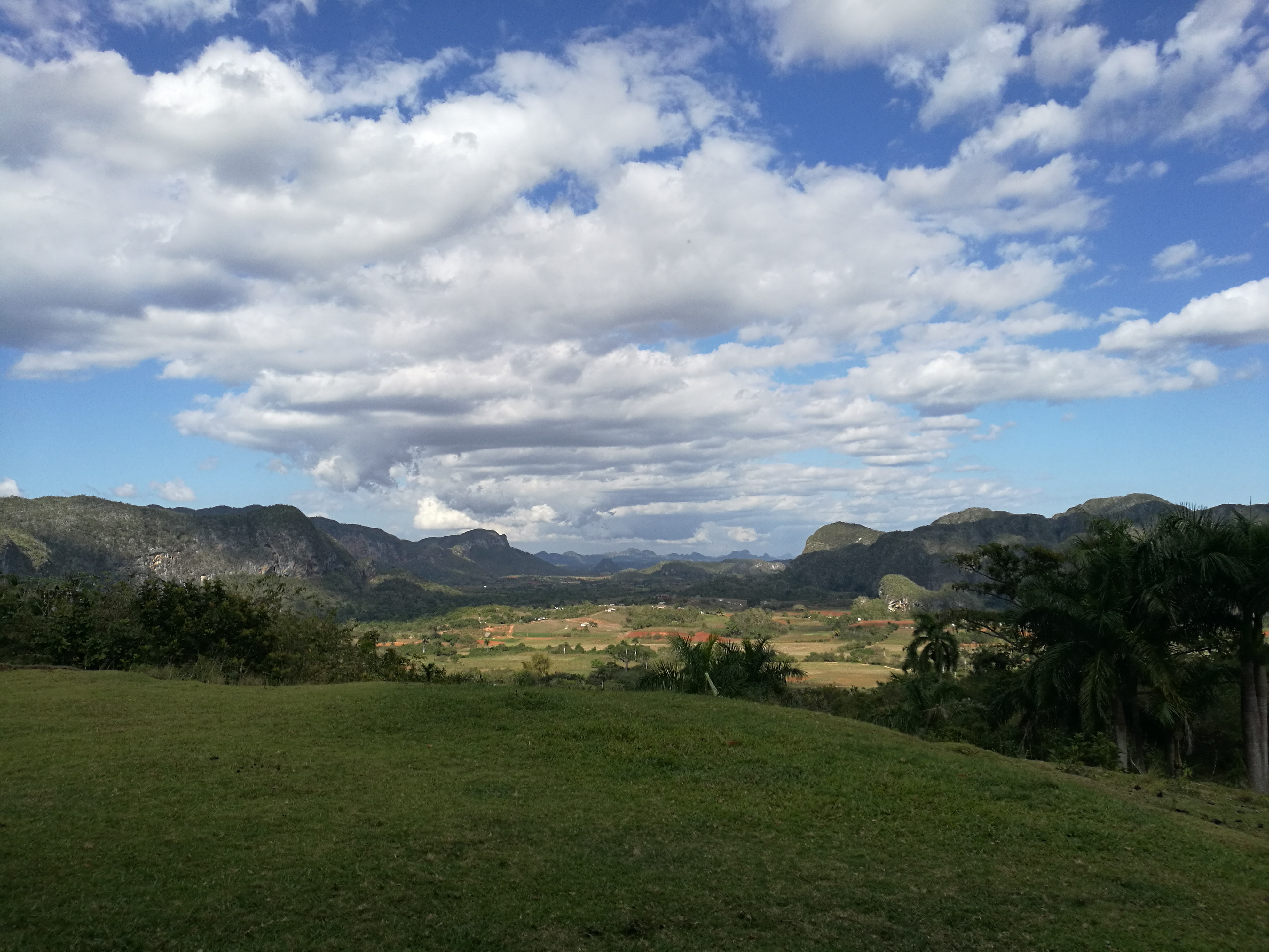 Valle de la Guasasa depuis Los Acuáticos, Viñales